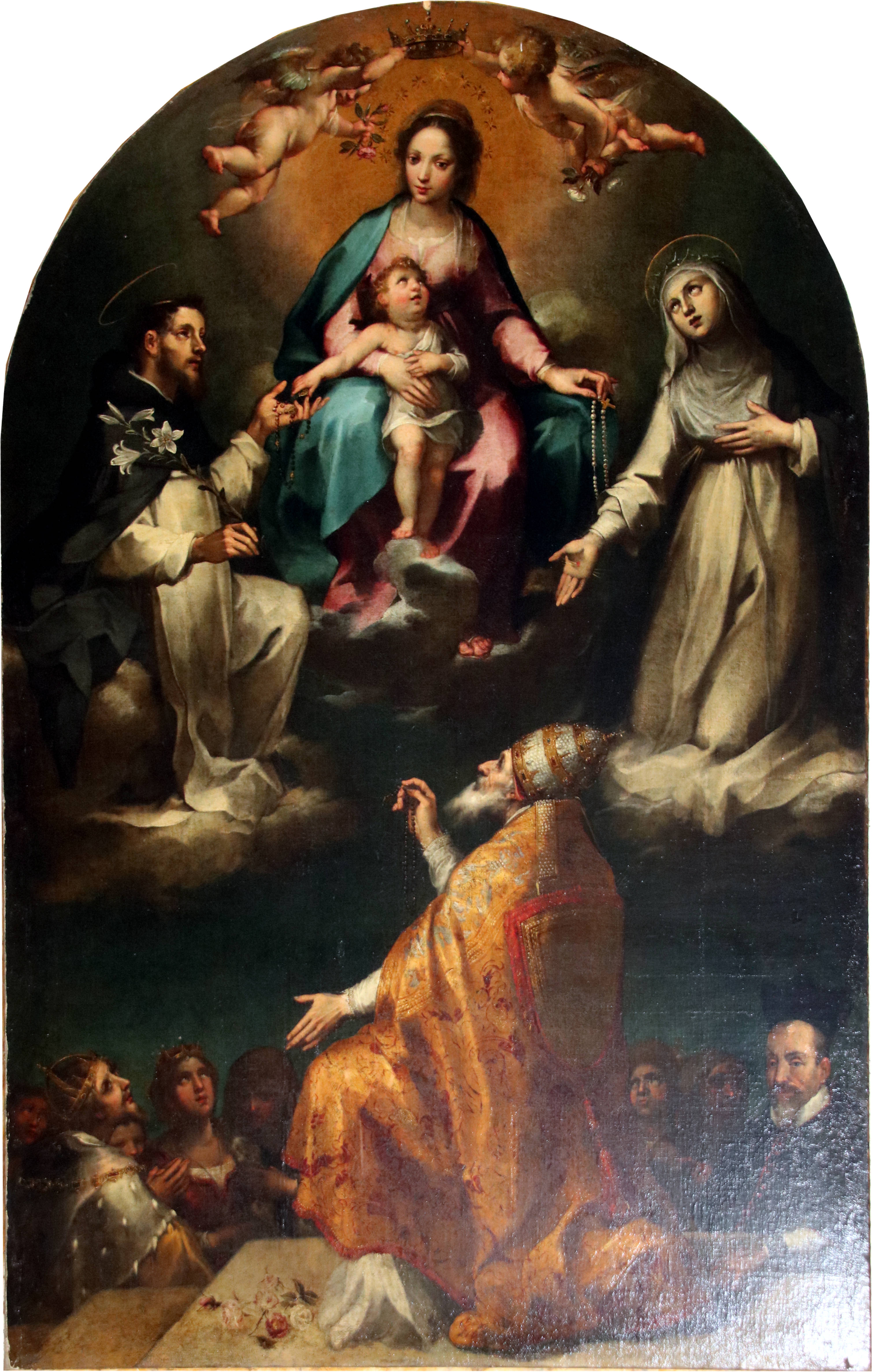 Francesco Vanni, La Madonna del Rosario con Santa Caterina da Siena, San Domenico e San Pio V, 1609, Cattedrale di Pitigliano